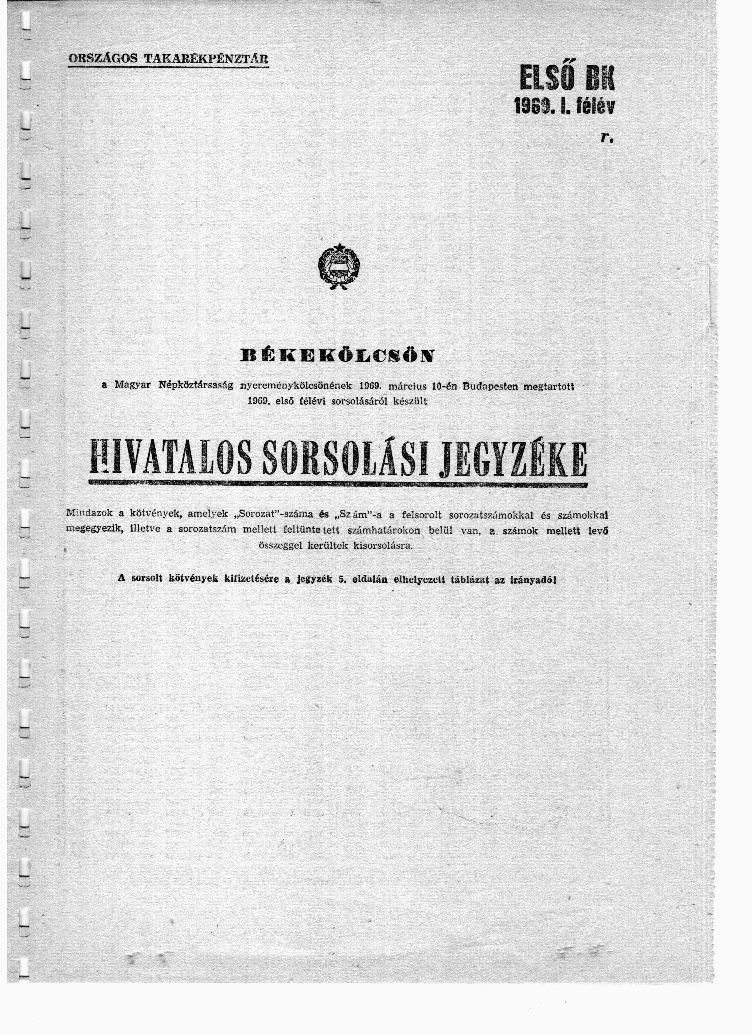 Az első békekölcsön hivatalos sorsolási jegyzéke. 1969. 2013. augusztus 4 -én szkennelt dokumentum. ©© Derzsi Elekes Andor, Budapest, 2013, You are authorised to use these photos and vids under Creative Commons – even for commercial, for profit purposes. Photos must be attributed to Derzsi Elekes Andor. All of the photos and vids in the Metapolisz DVD line are under Creative Commons and can be used even for commercial – for profit – purposes. Recommended Citation Derzsi Elekes Andor: Metapolisz DVD line